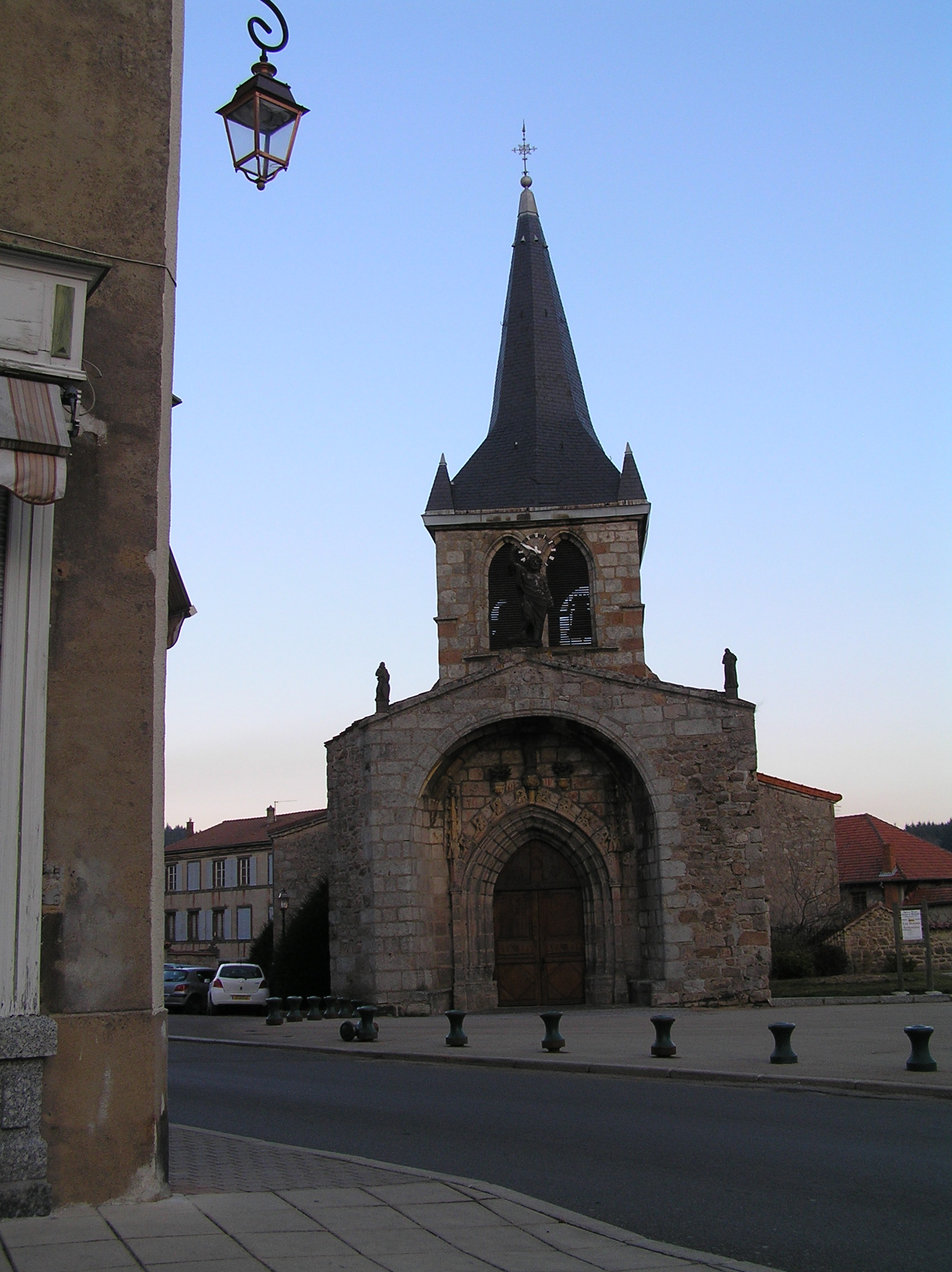 Église de Noirétable (Loire, Rhône-Alpes, France).